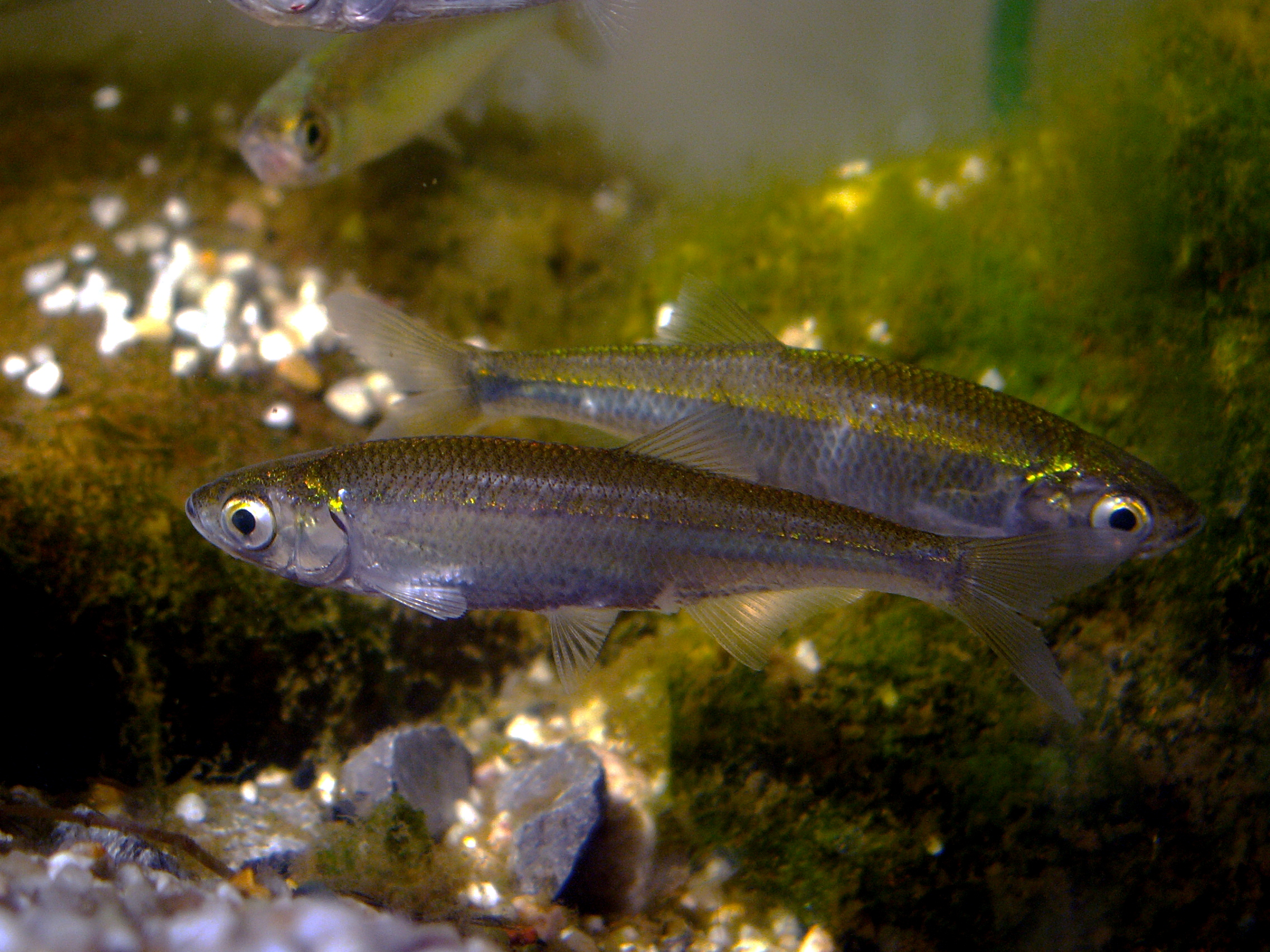 Female "Leucaspius delineatus"